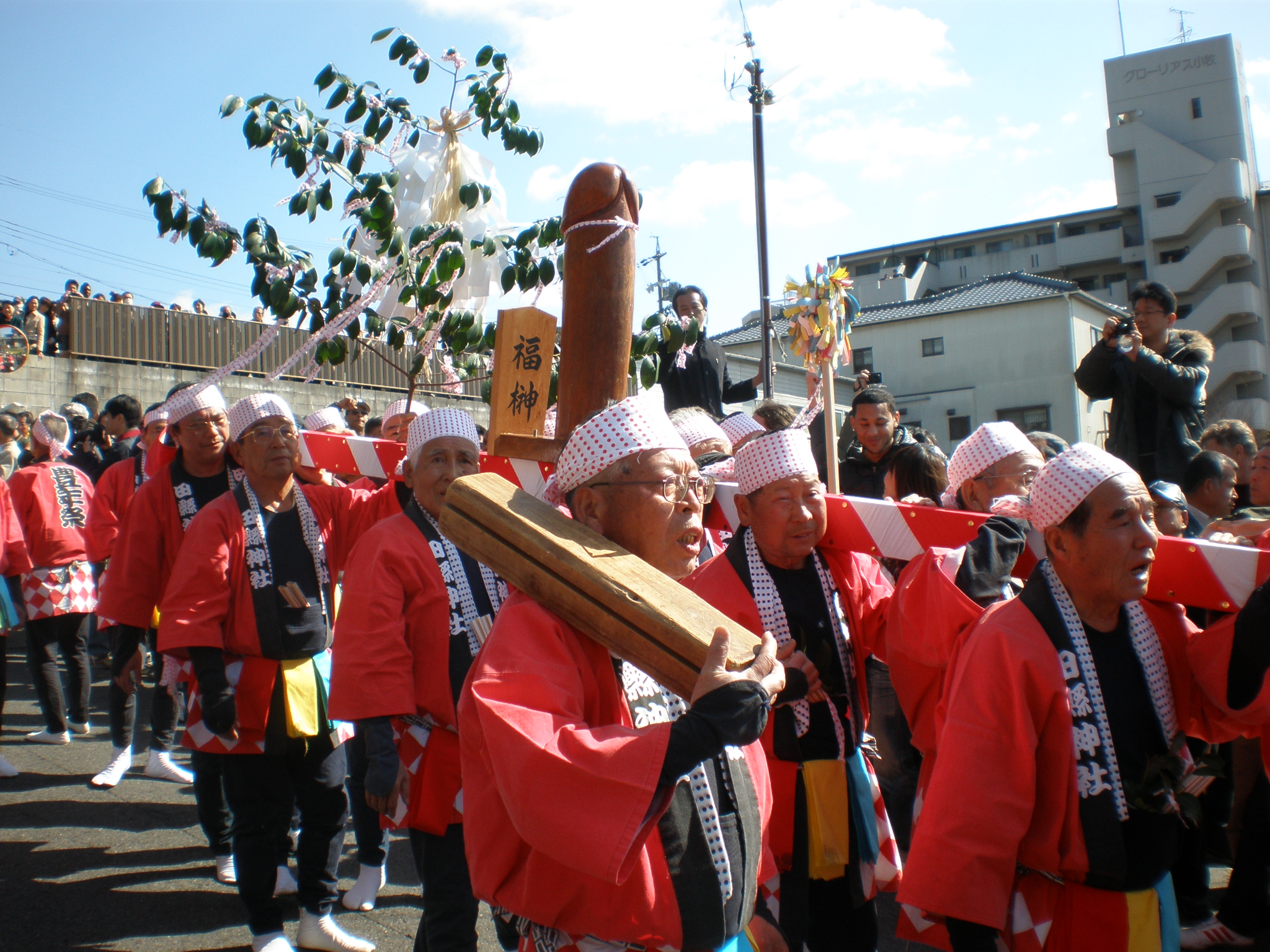 愛知県小牧市の田縣神社で行われる豊年祭